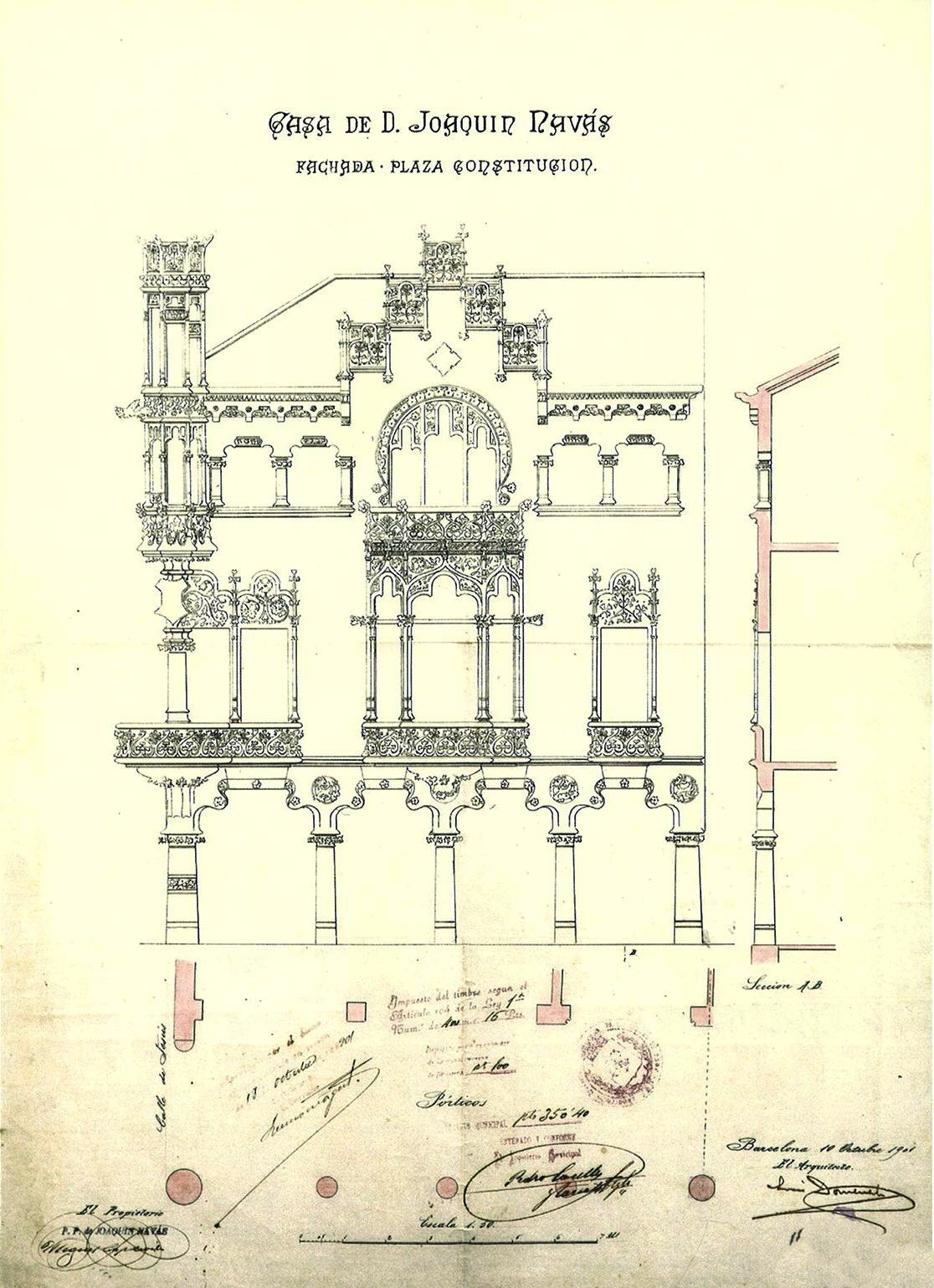 Alçat de la façana de la Casa Navàs (Reus), obra de Lluís Domènech i Muntaner de 1901-1908.